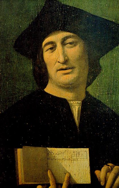 Filippo Mazzola, Ritratto di musico, (1505?).Parma, Galleria Nazionale.